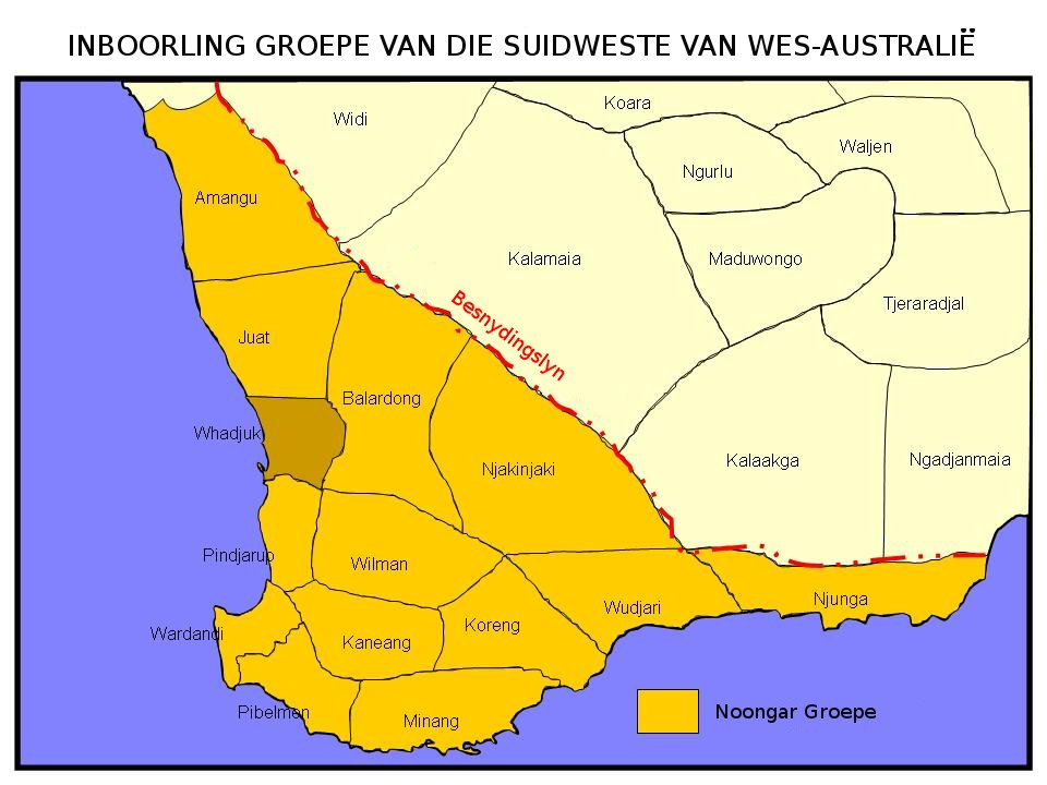 Die Wadjuk se grondgebied in Wes-Australië.